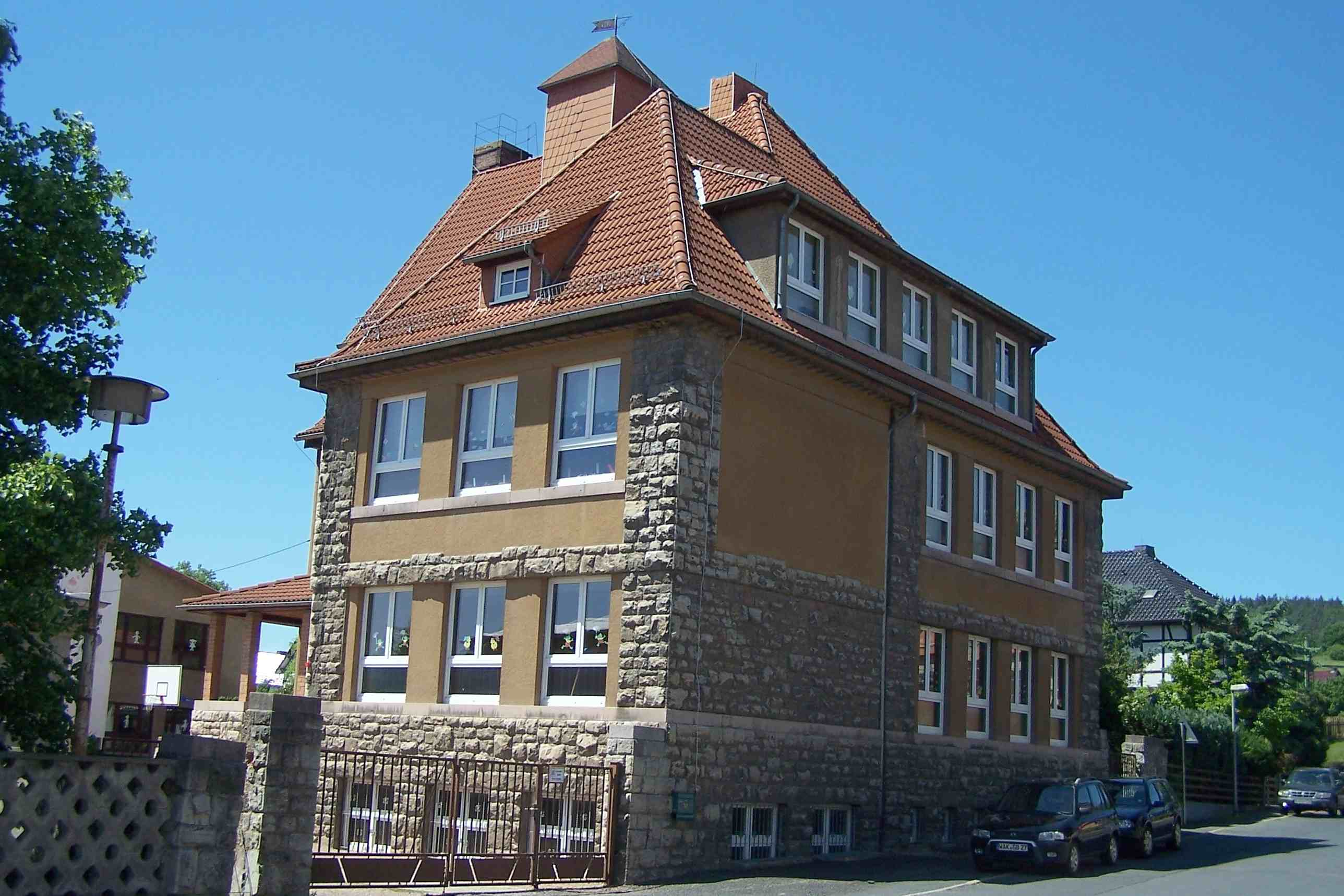 Teilansicht der Schule.